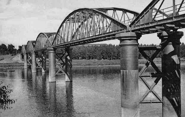 Puente de Alfonso XII, en el área de Chapina, en Sevilla